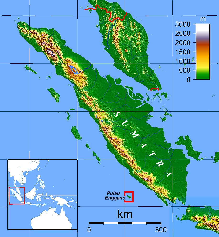 Lage der Insel Enggano